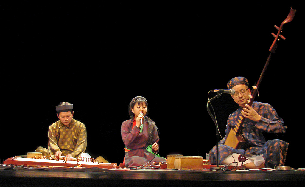 Concert du vendredi 9 novembre, dans l'auditorium du musée Guimet à Paris. Huong Thanh Trio, Musique traditionnelle du Vietnam avec Mieko Miyazaki, invitée Avec Huong Thanh (vocal), Hong Nguyen et Hao Nhiên Pham (Dan Tranh, Dan Bau, Dan Nguyet, T’rung, Dan Nhi, Dan Ty Ba Song loan, Senh tien, De drum) Huong Thanh a proposé une interprétation de la musique traditionnelle des trois régions du Vietnam : celle du Nord, voluptueuse et céleste, celle du Sud, nostalgique et touchante, en passant par celle du Centre, majestueuse et impériale.